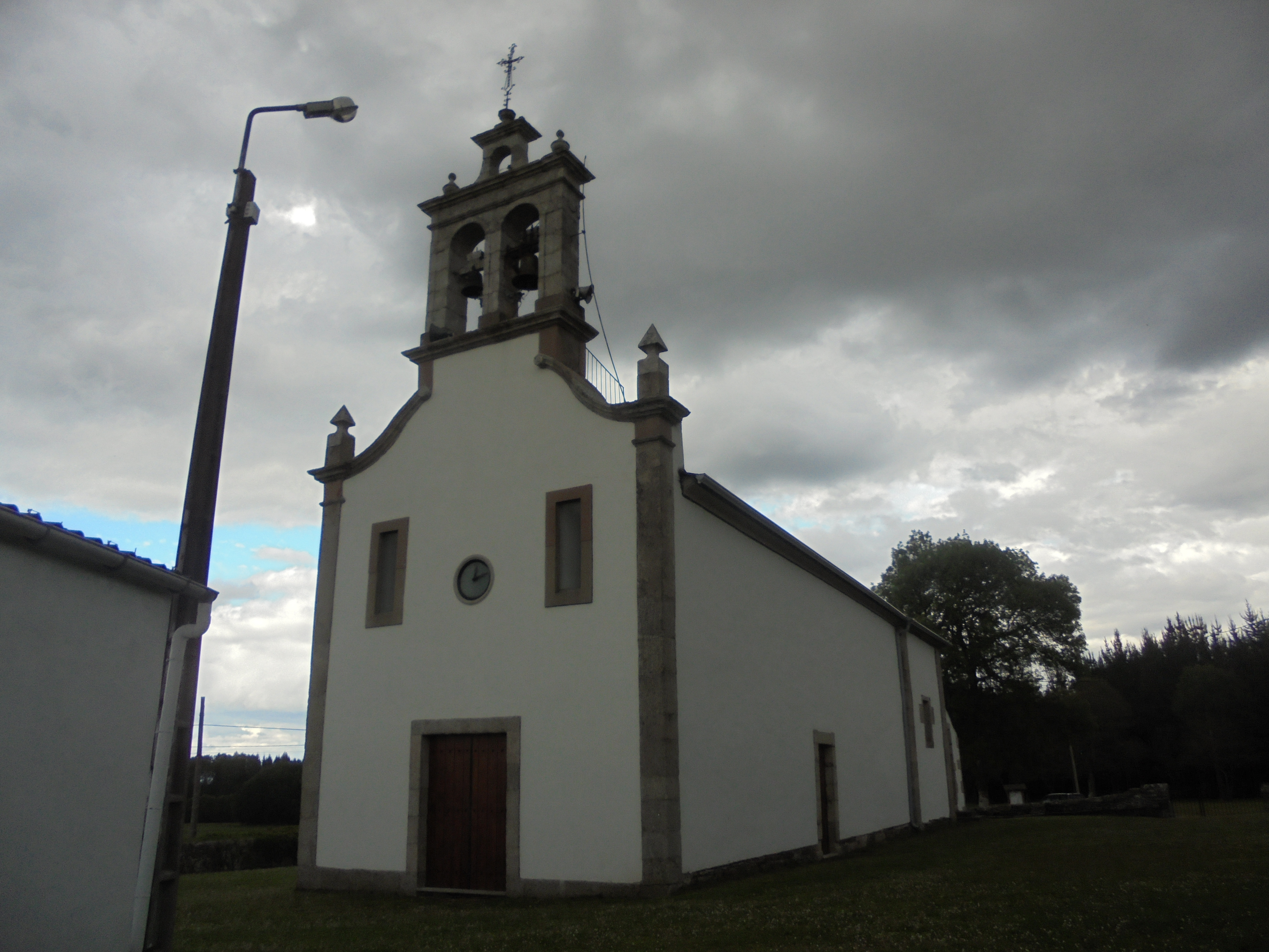 Igrexa parroquial de Arcos ( Outeiro de Rei)